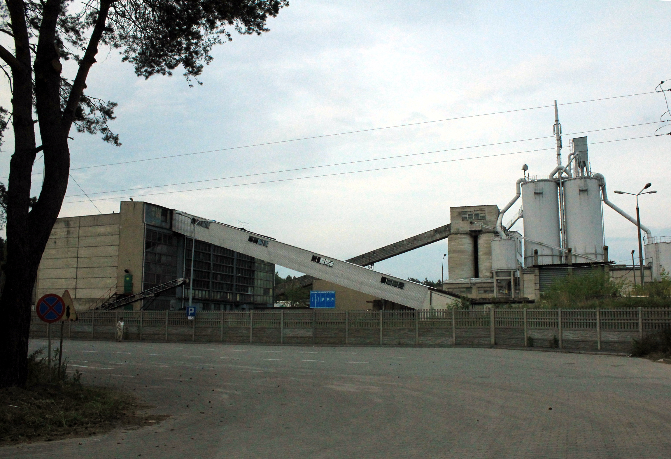 Podnieśno - zakłady Solbet, woj. mazowieckie